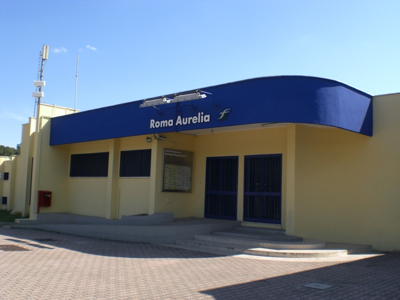 Stazione di Roma Aurelia